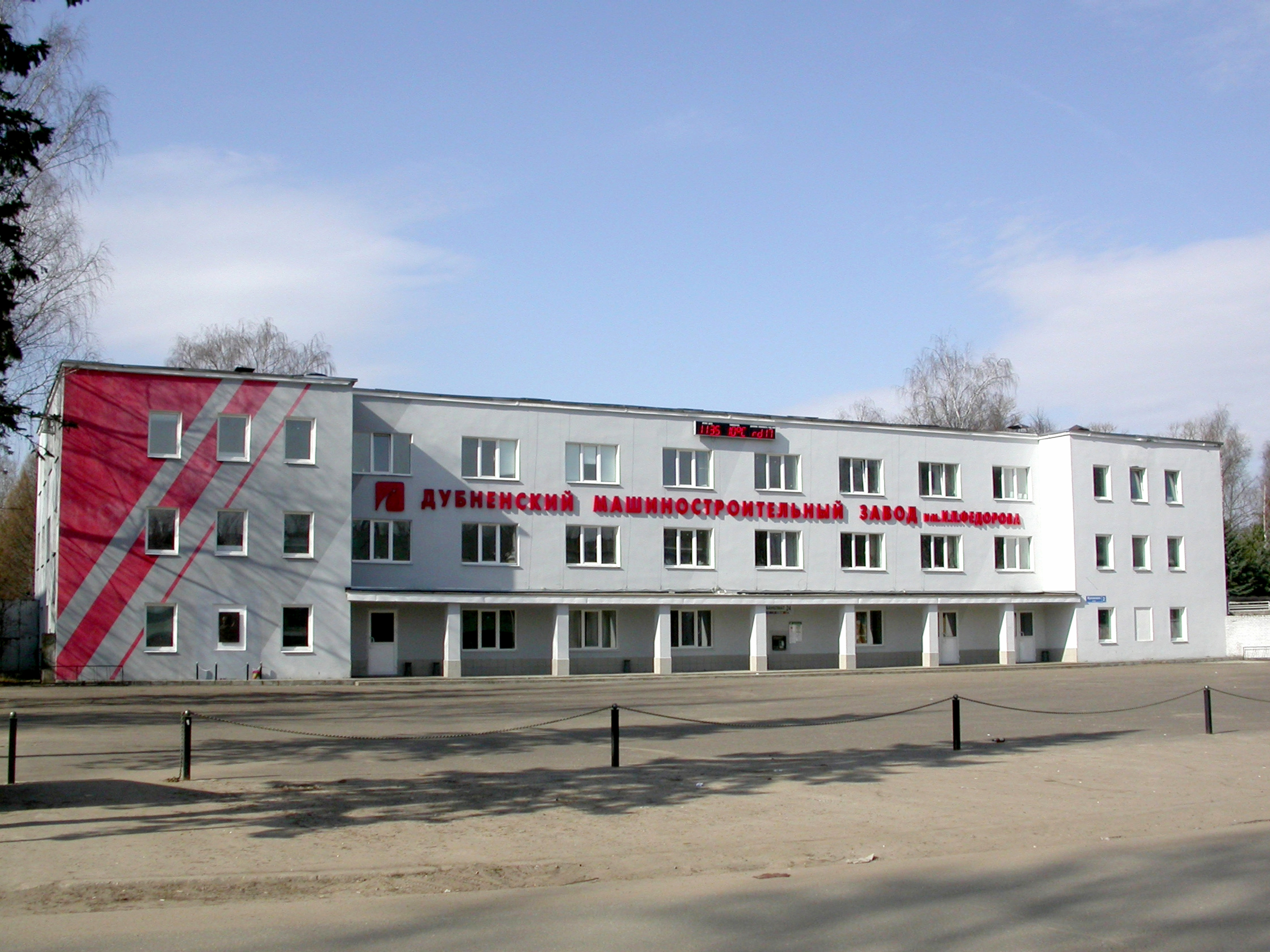 Проходная завода